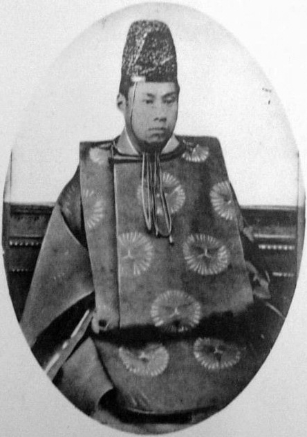 a Japanese man 有栖川宮熾仁親王 (Taruhito Arisugawanomiya)